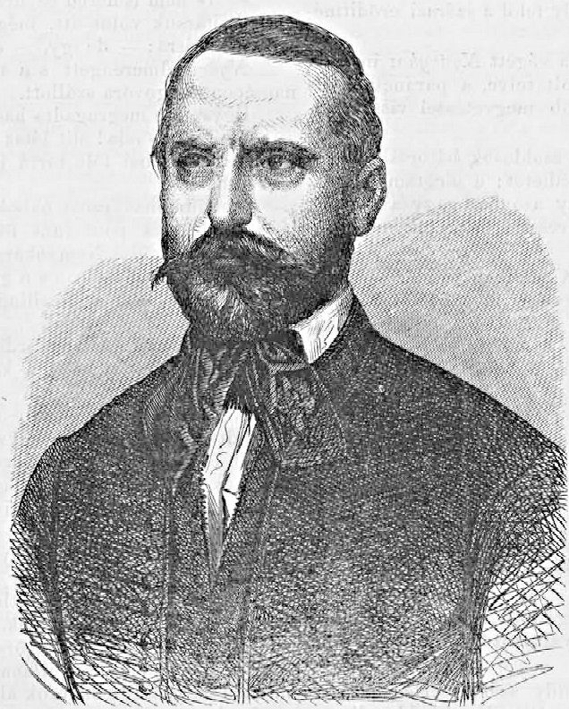 ifj. Bartal György (1820–1875) politikus, miniszter (Vasárnapi Ujság, 1862. január 12.)